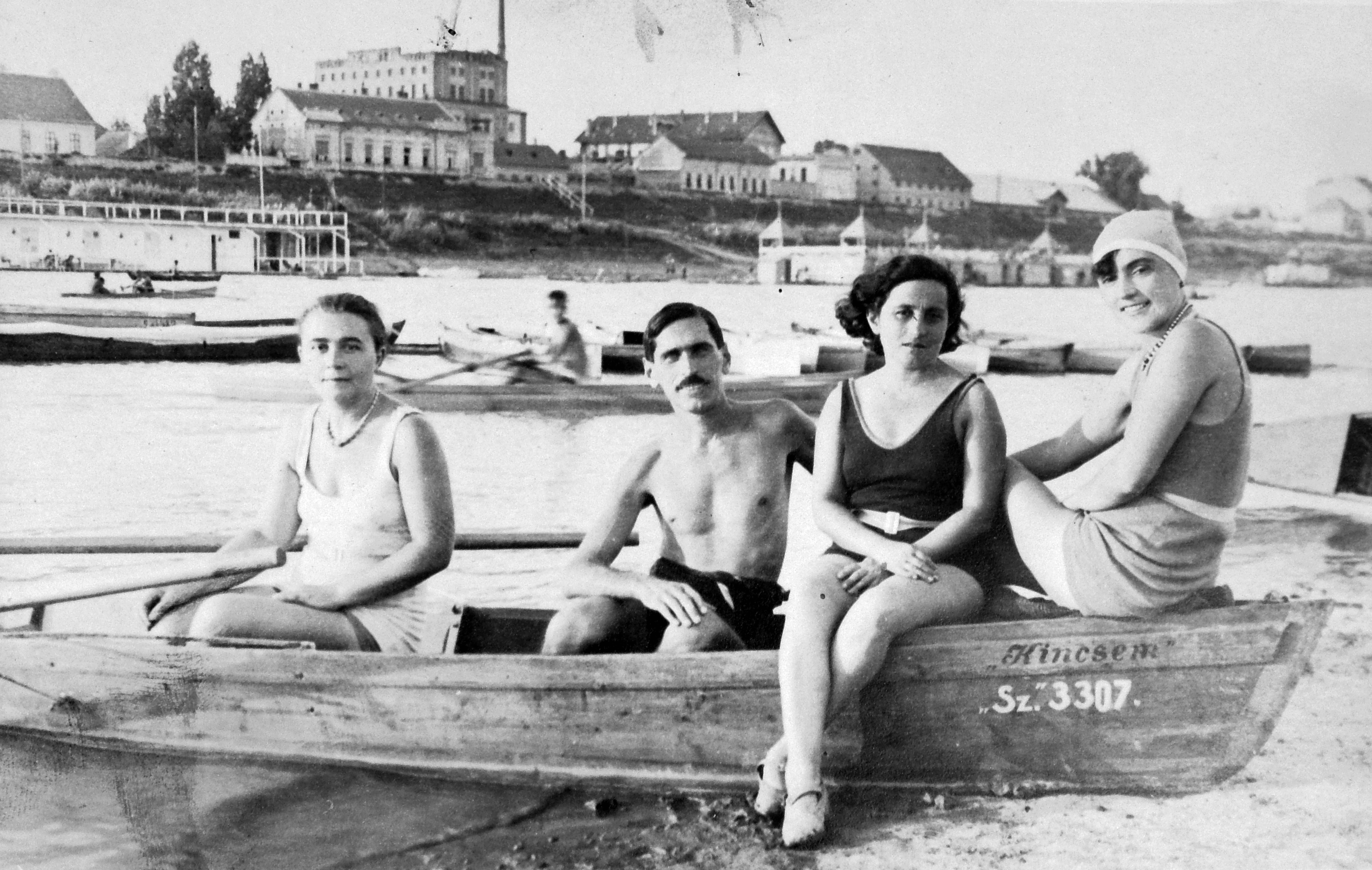 partfürdő, háttérben a Felső-Tiszapart, a PICK szalámigyárral. Location: Hungary, Szeged Tags: boat Title: partfürdő, háttérben a Felső-Tiszapart, a PICK szalámigyárral.